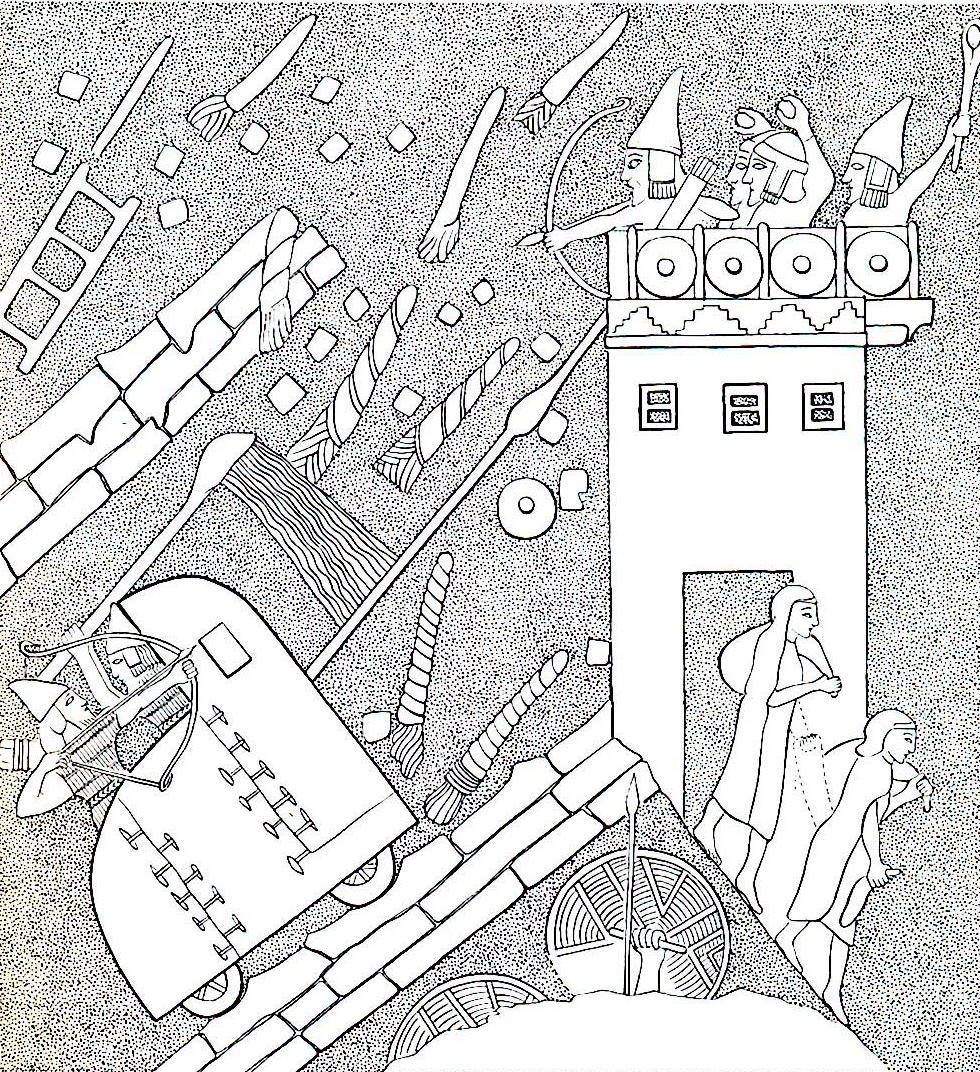 Angriff auf die judäische Stadt Lachisch